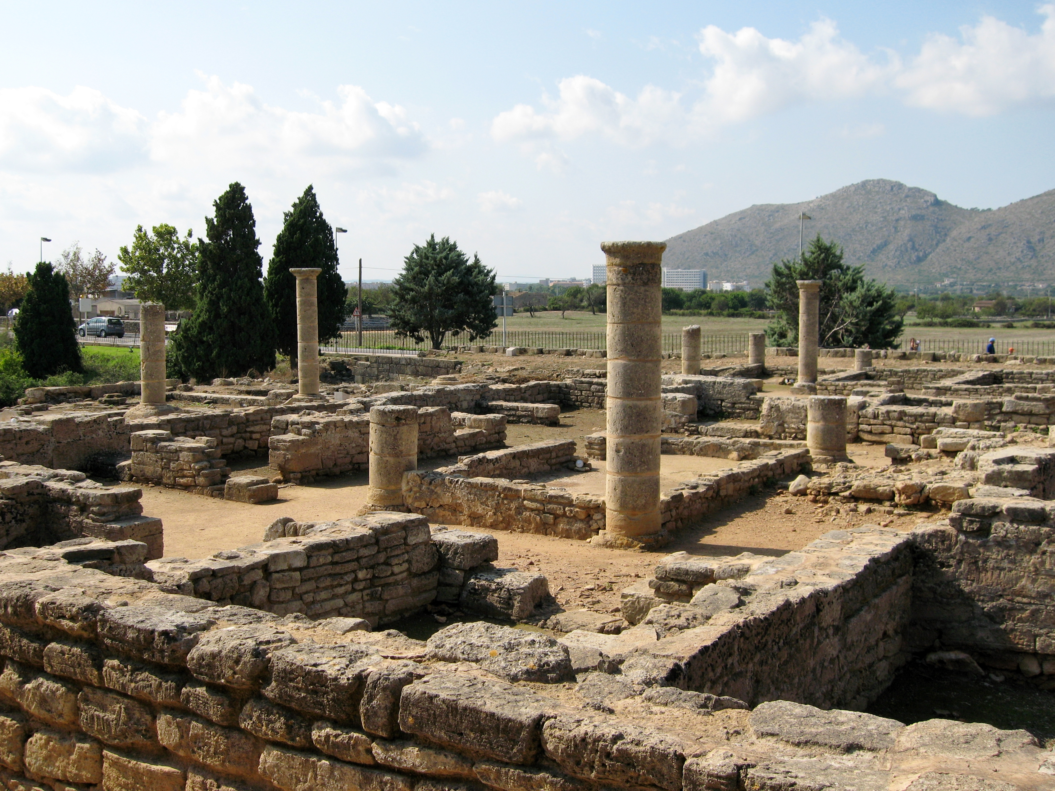 Ruinen der antiken Stadt Pollentia (katalanisch: Poŀlèntia), Gemeinde Alcúdia, Mallorca, Spanien